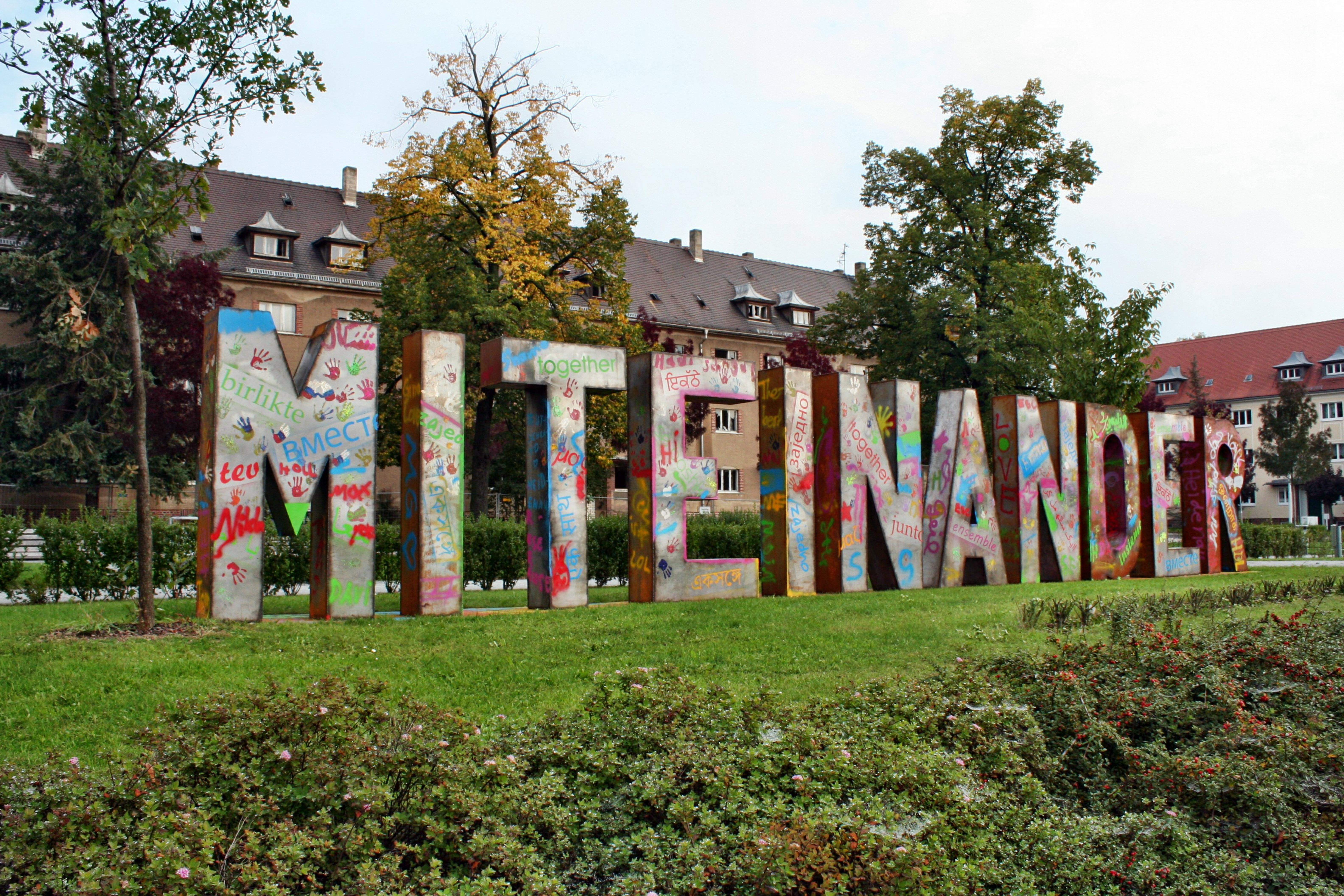 Heidenau, Skulptur "Miteinander" Denkmal vom deutsch-türkischen Metallkünstler Hüseyin Arda (Platz der Freiheit)